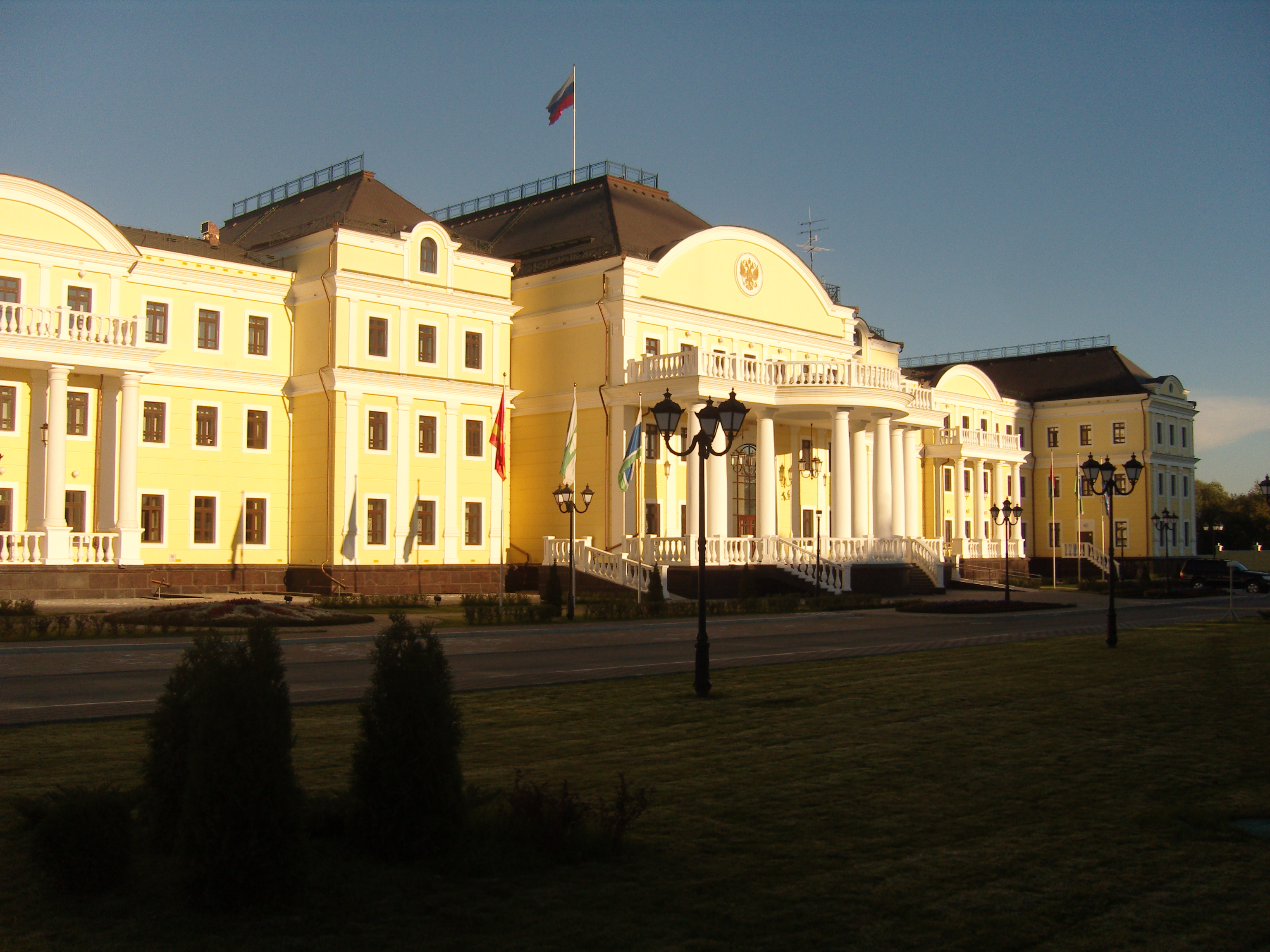 Полпредство УРФО